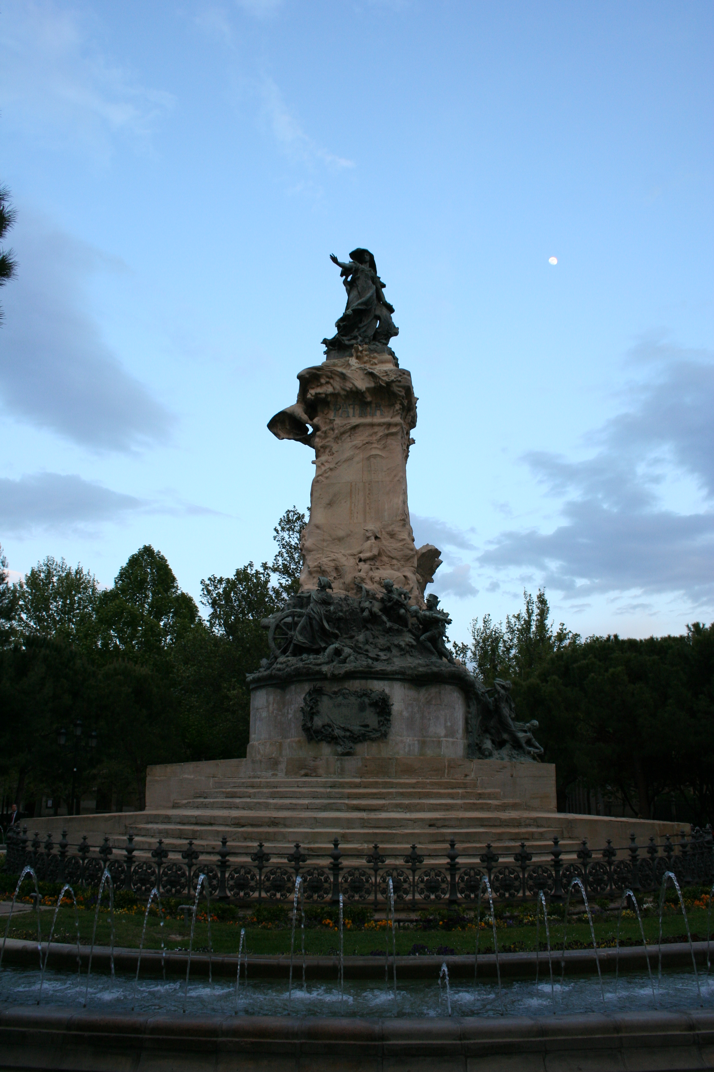 Monumento a los Héroes de la Patria, Plaza de los Sitios.